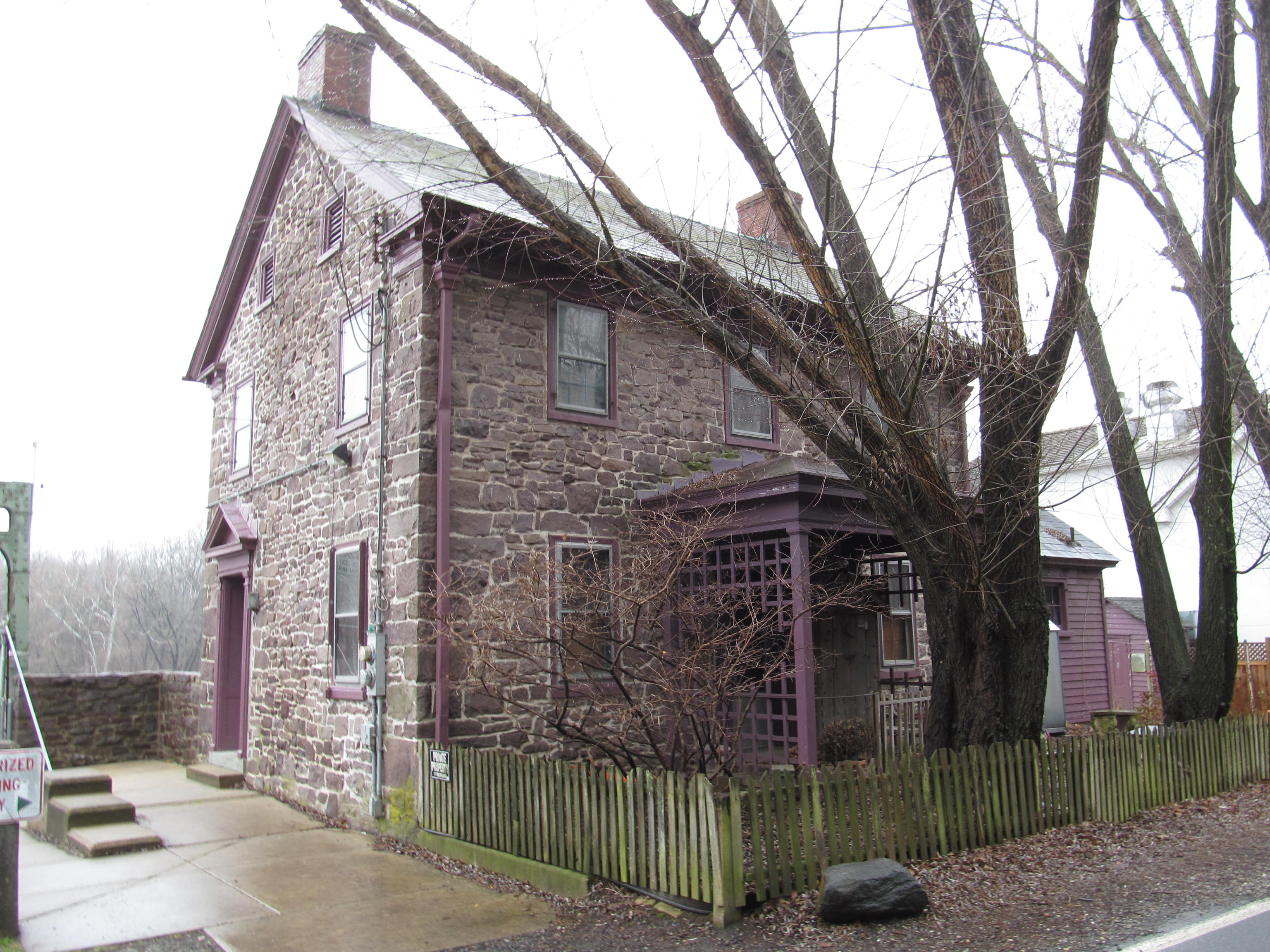 Lumberville, Pennsylvania